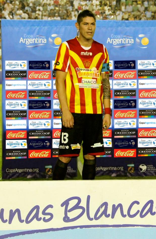 el Formoseño Paulo Centurión posando para los reporteros gráficos previo al partido entre el Club Atlético Sarmiento de Resistencia (Chaco) y el Racing Club de Avellaneda correspondiente a los octavos de final de la Copa Argentina edición 2011/2012